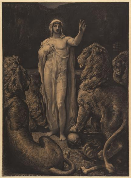 Les Lions (d'après Victor Hugo)